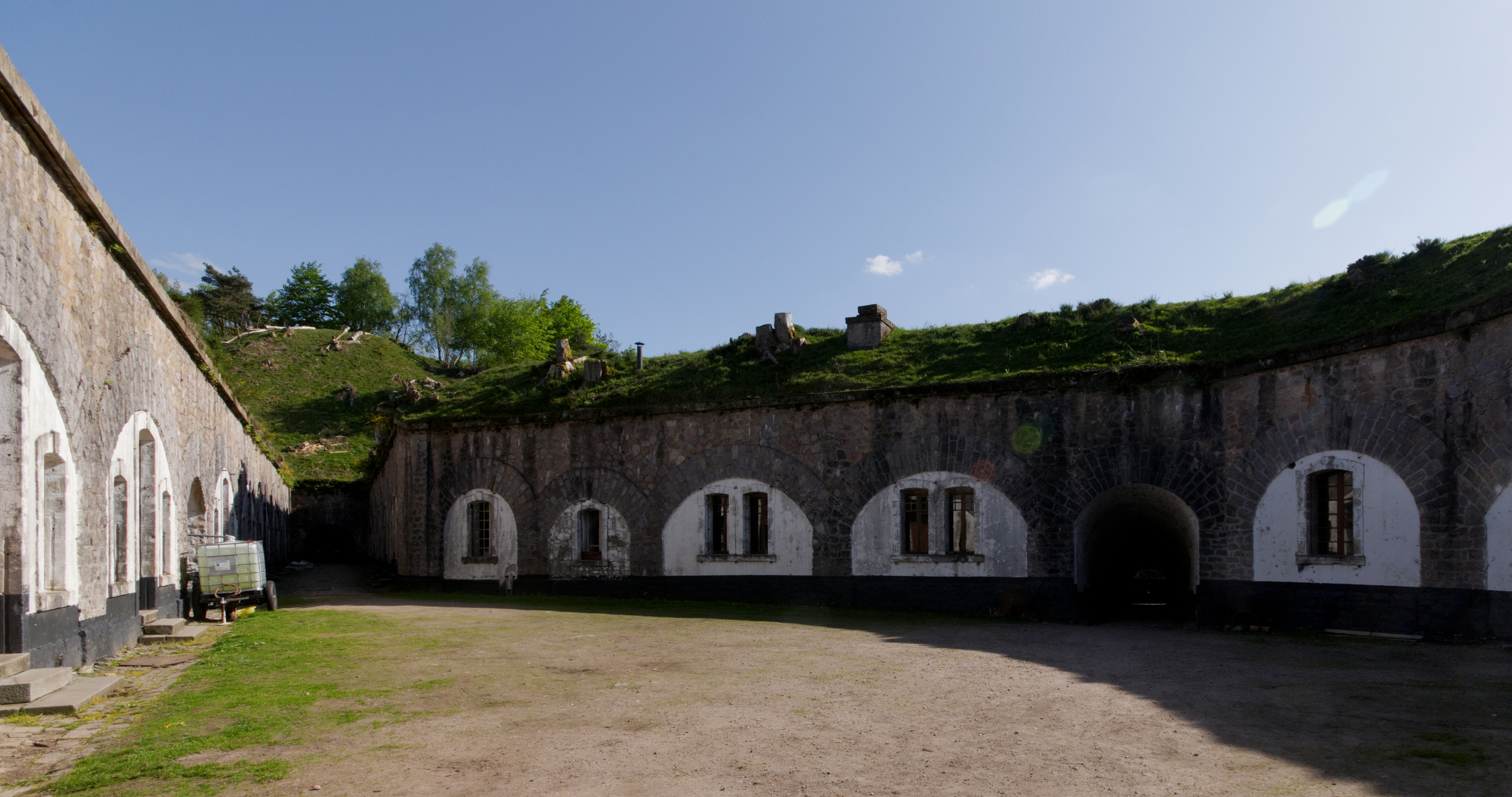 This photograph was taken with a Nikon D300 Fort du Parmont : dans la cour intérieure.